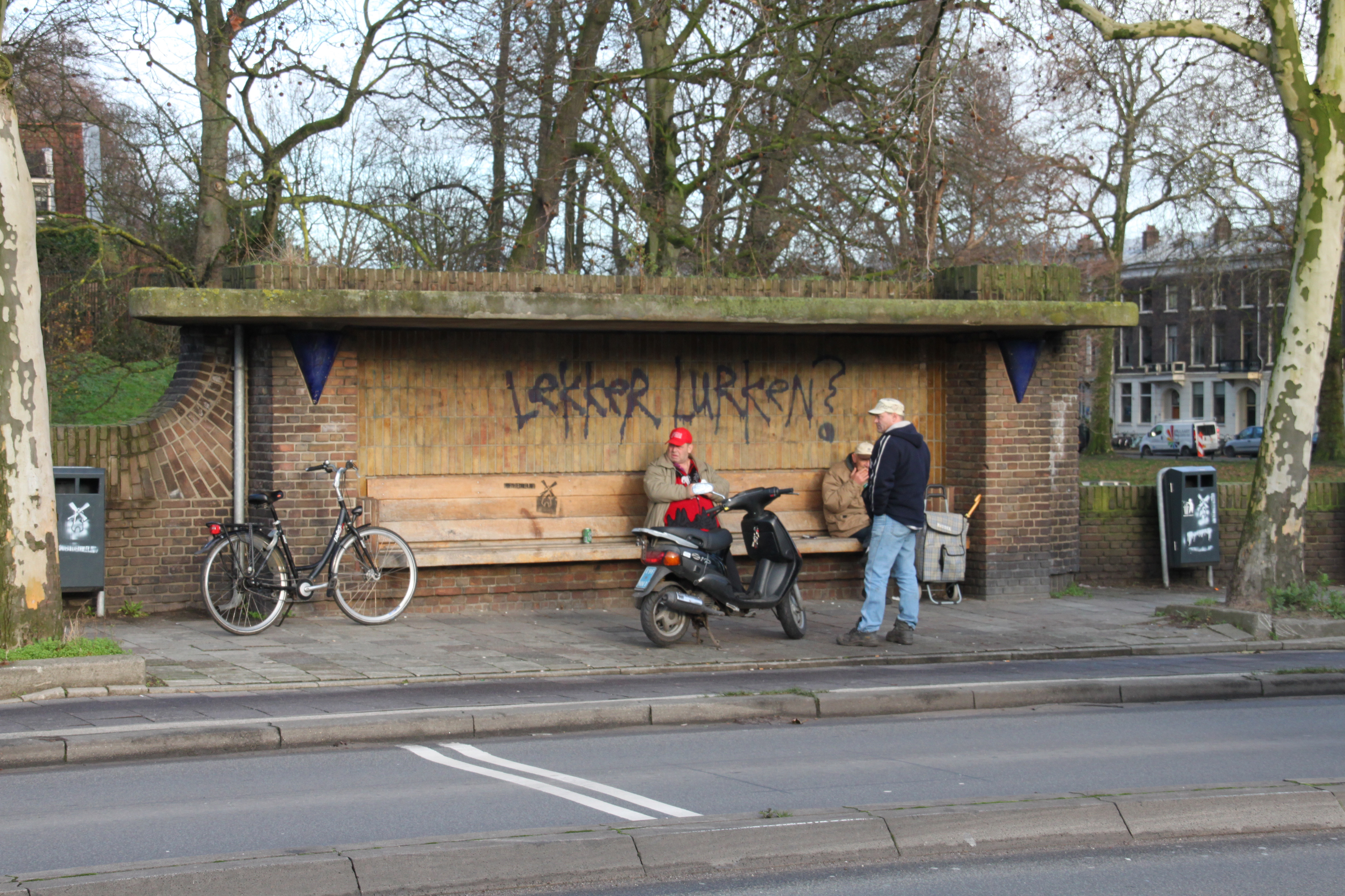 Een voormalig tramhokje van de Gemeentetram Utrecht op het Ledig Erf in Utrecht.